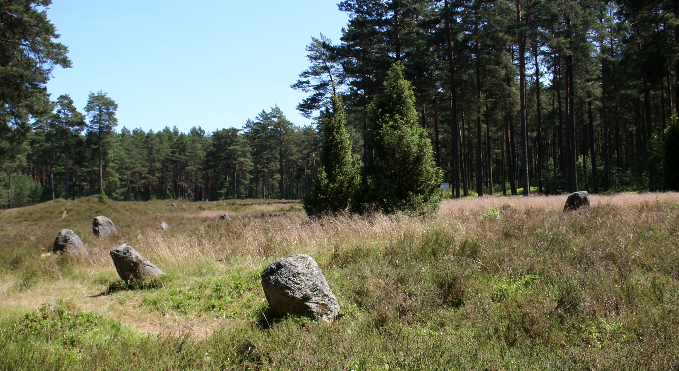 Fragment kręgu IV na cmentarzysku Gotów w Odrach, gmina Czersk Fragment of Circle IV of the cemetery of Odrach, Gmina Czersk